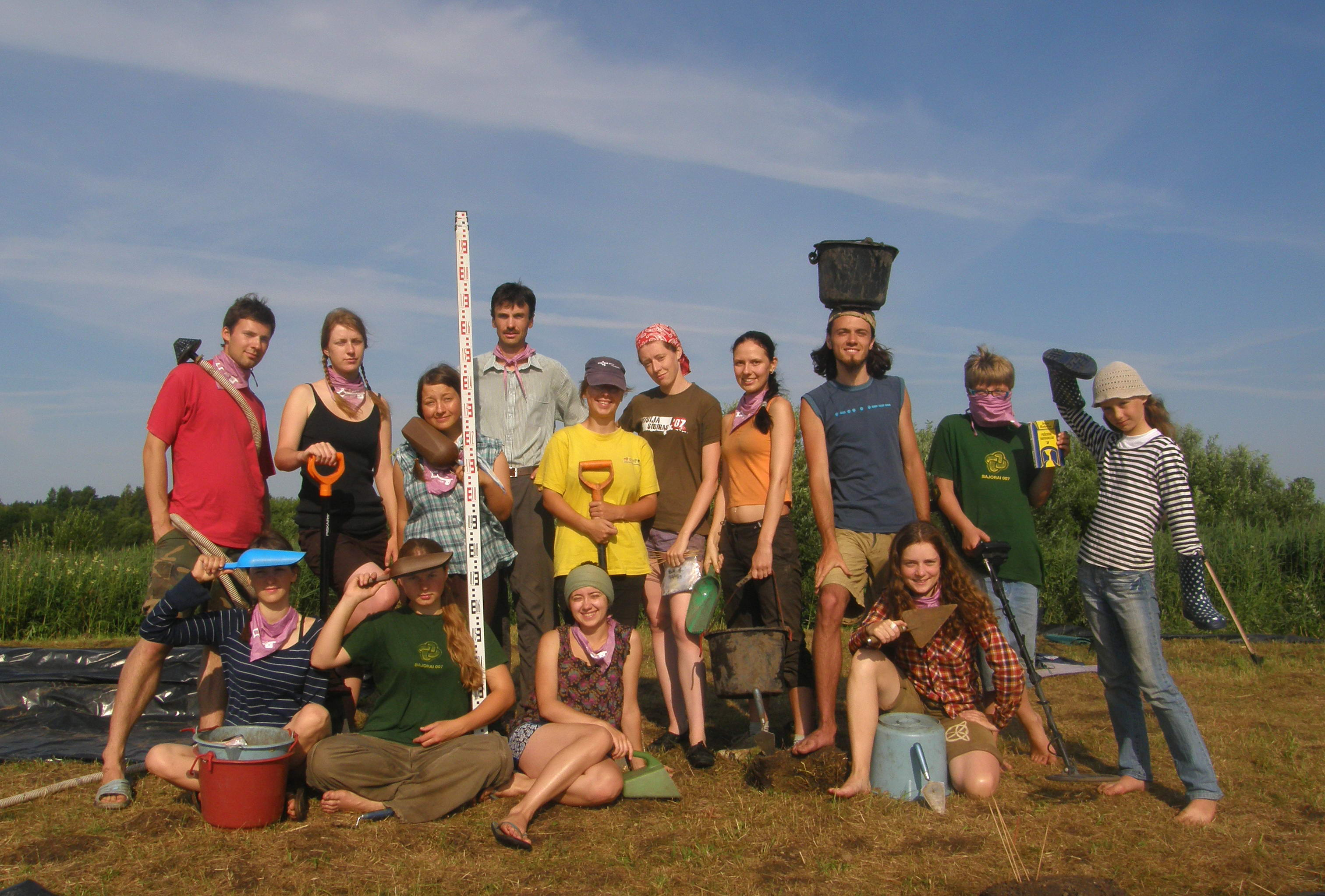 2009 m. Bajorų ekspedicijos dalyviai